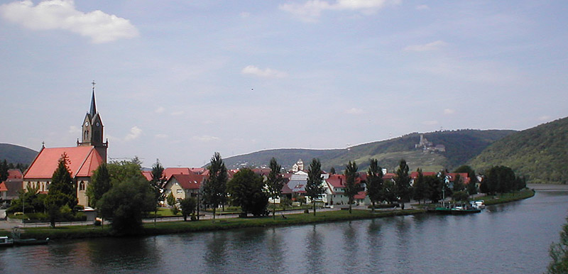 Blick von Böttingen über den Neckar nach Haßmersheim